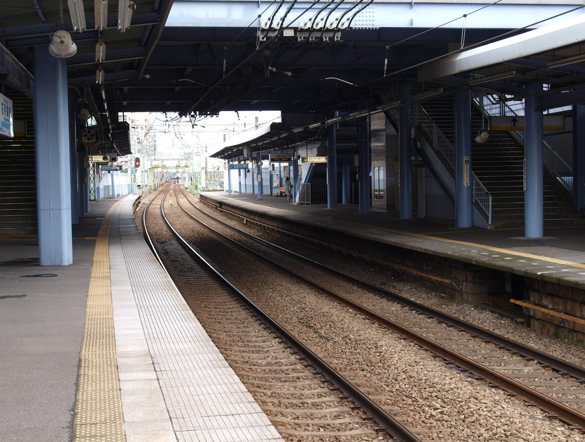 花月園前駅プラットホーム